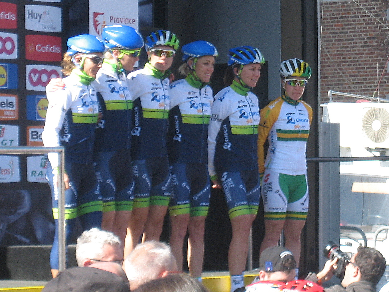 Orica-AIS voor start Waalse Pijl 2016